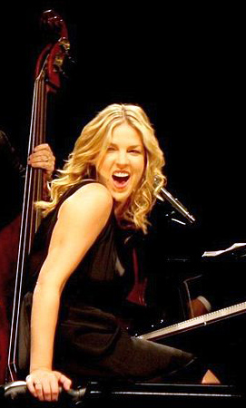 Diana Krall in Köln, Ausschnittvergrößerung